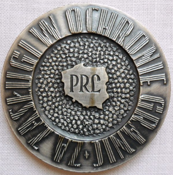 Medal pamiątkowy